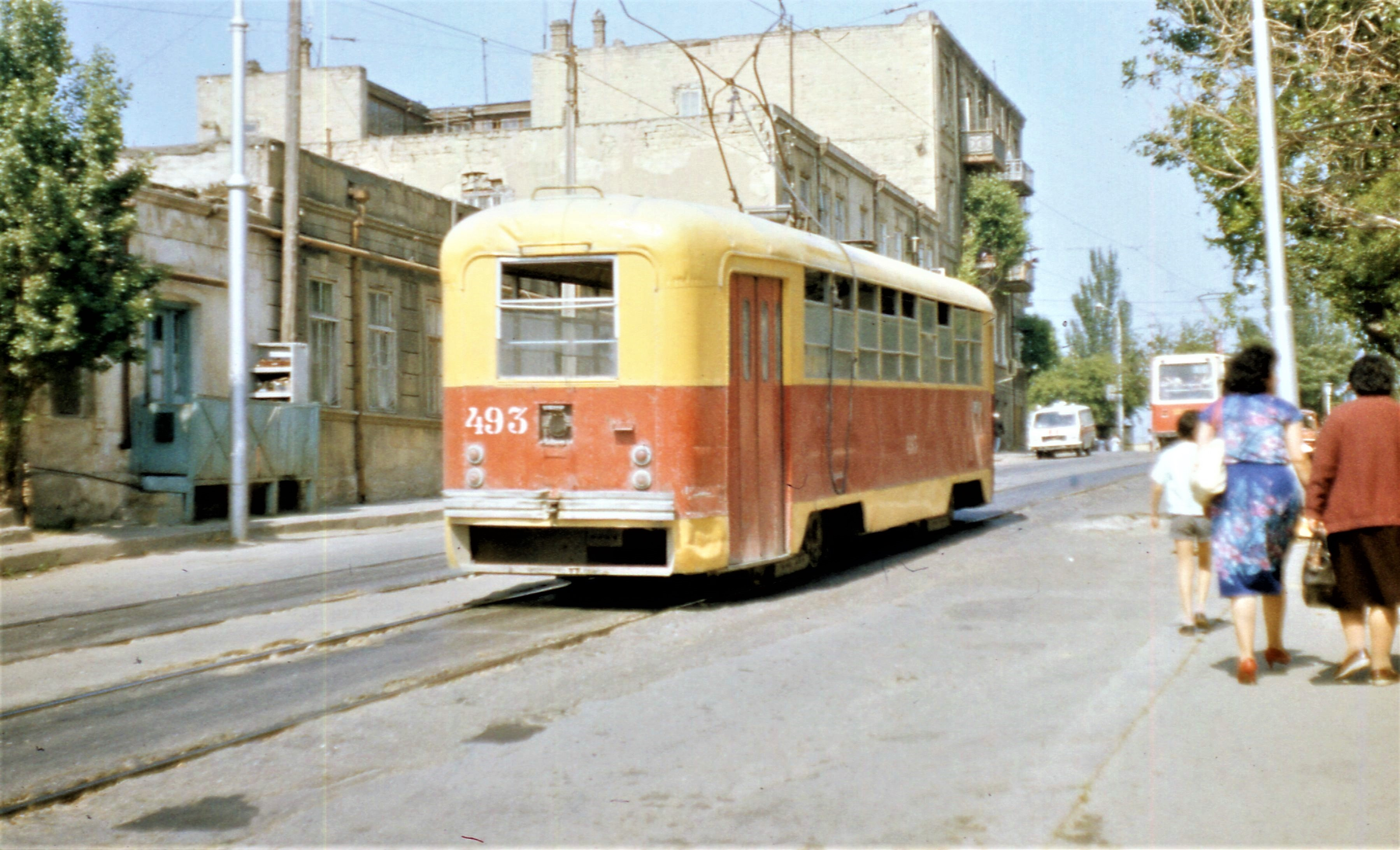 Aserbaidschan 1987